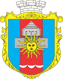 Герб Ладижина